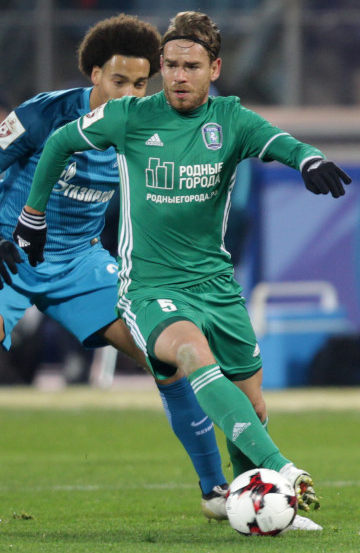 Эрик Бикфалви